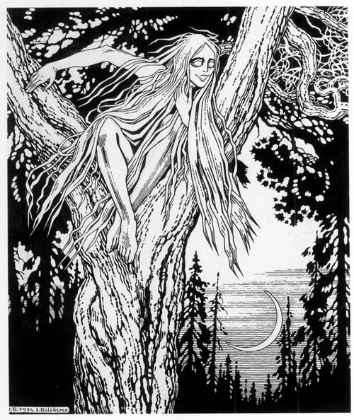 Rusalka